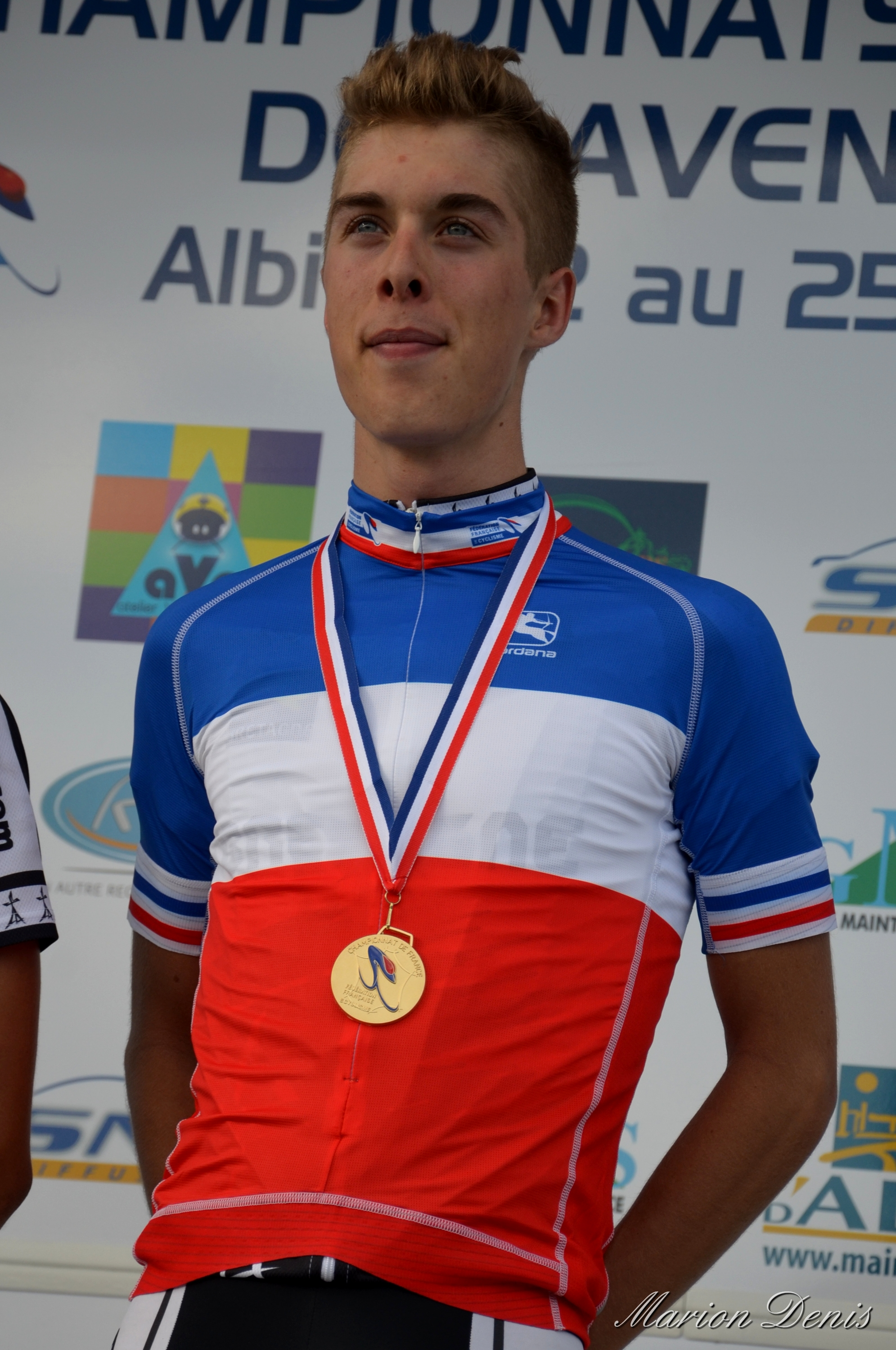 Élie Gesbert - Championnat de France Junior 2013